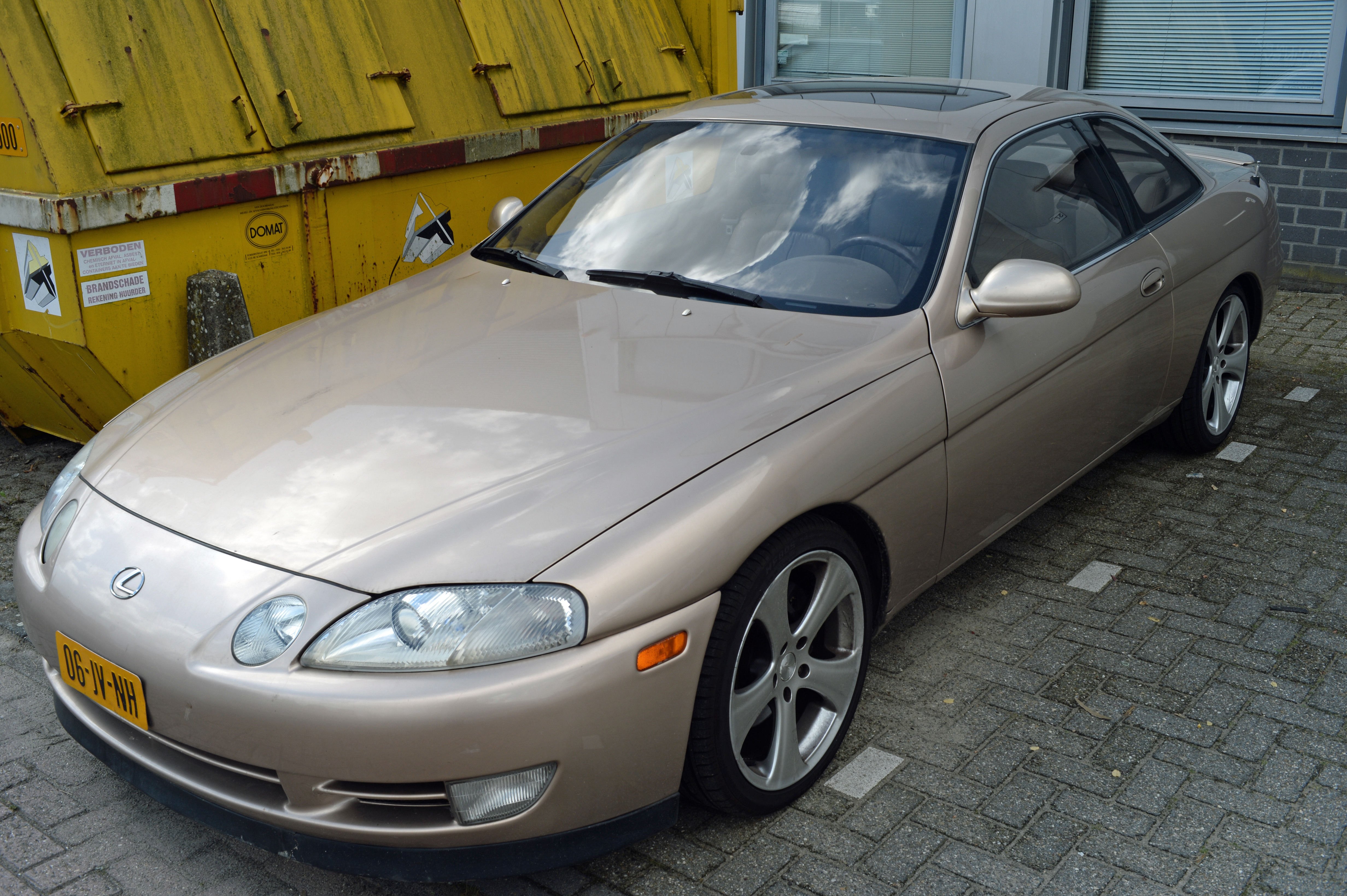 1992 Lexus SC 400